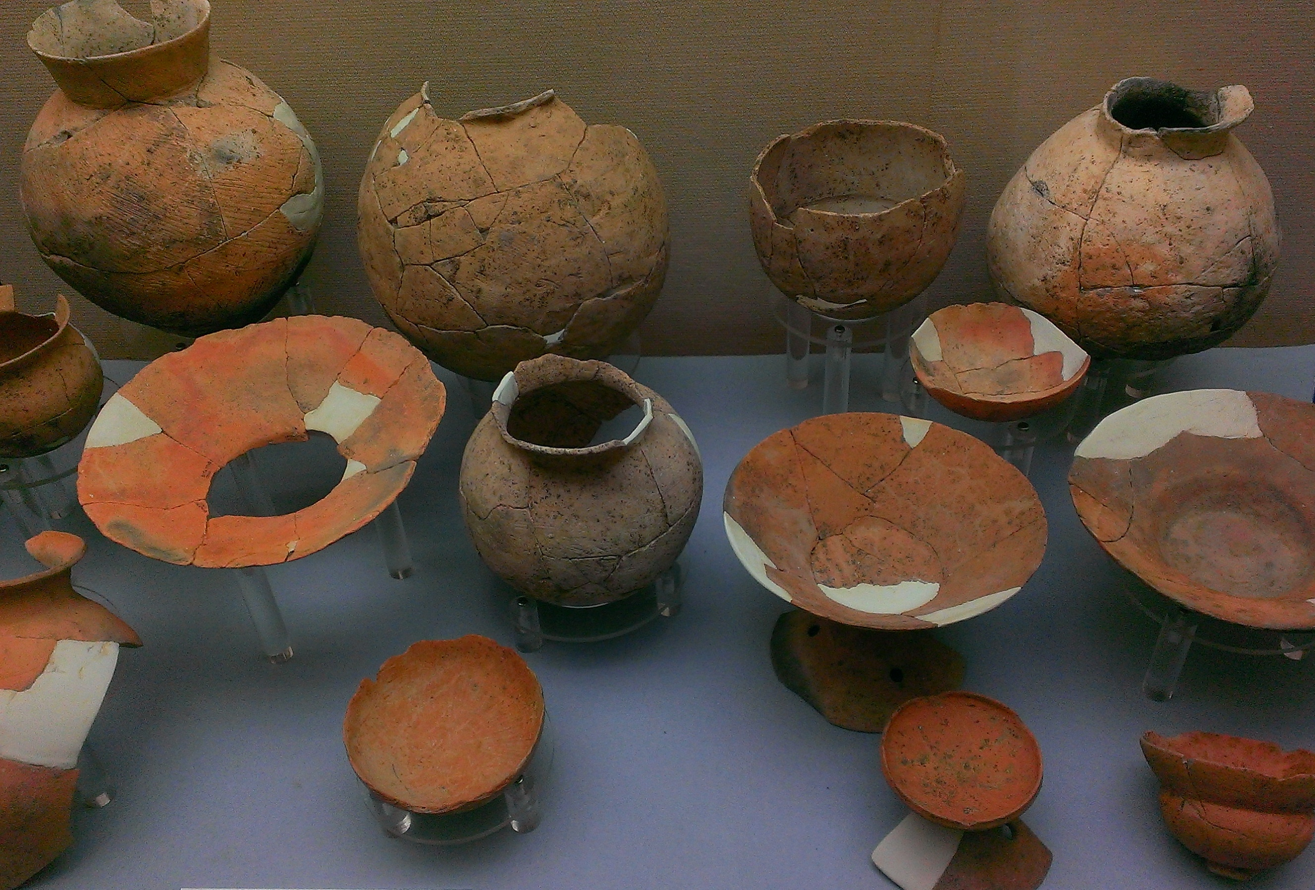 巻向遺跡第174次調査（古墳時代初頭） SK-105 下層出土遺物 桜井市立埋蔵文化財センター展示品